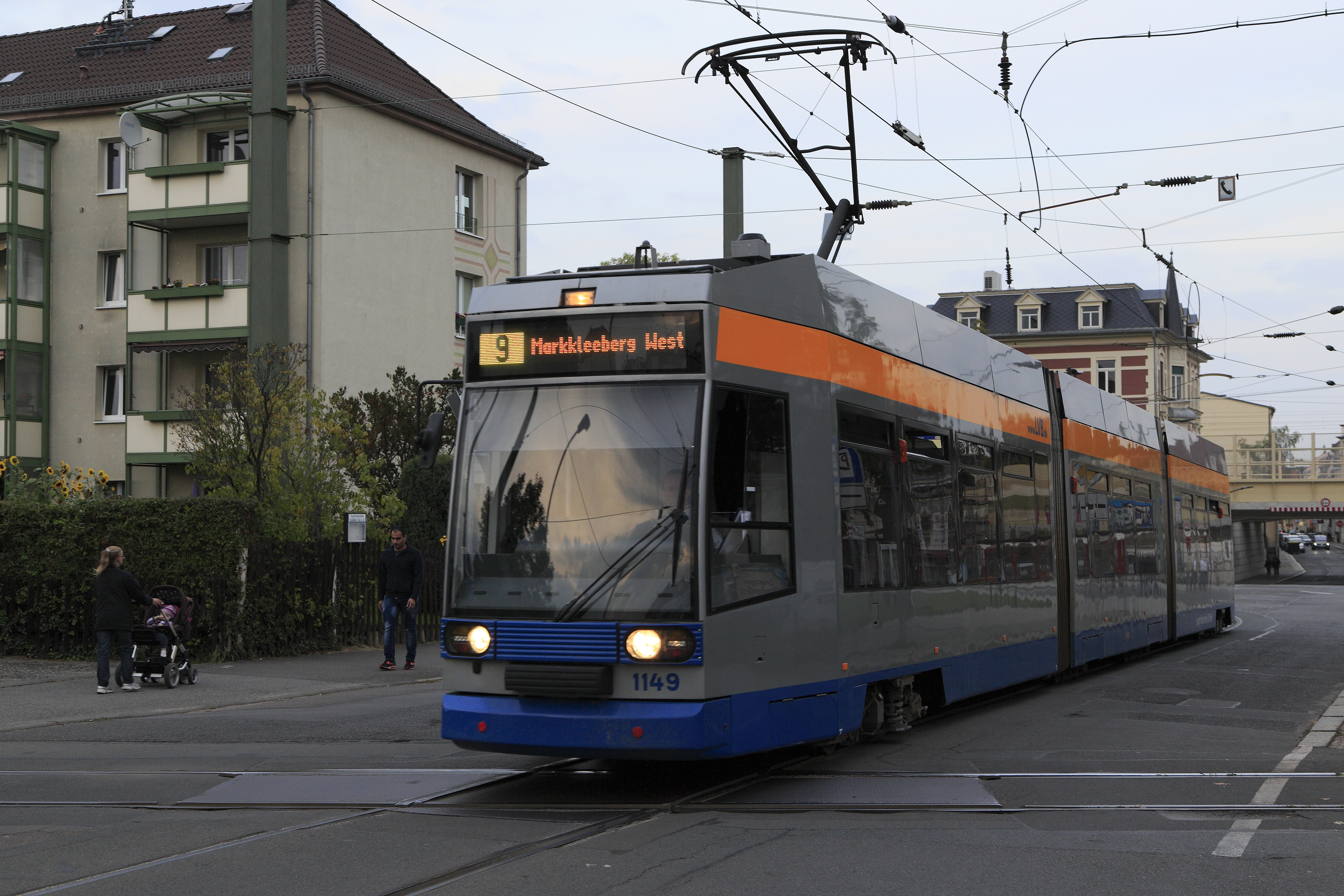 Straßenbahnzug der Linie 9 Richtung Markkleberg West auf der Fernbahnkreuzung am Posten 1, dreieinhalb Wochen vor der Betriebseinstellung. Noch ist das in der Öffentlichkeit weitgehend unbekannt, der Ausbau der Kreuzung ist jedoch bereits für den 4. Dezember 2015 beauftragt.